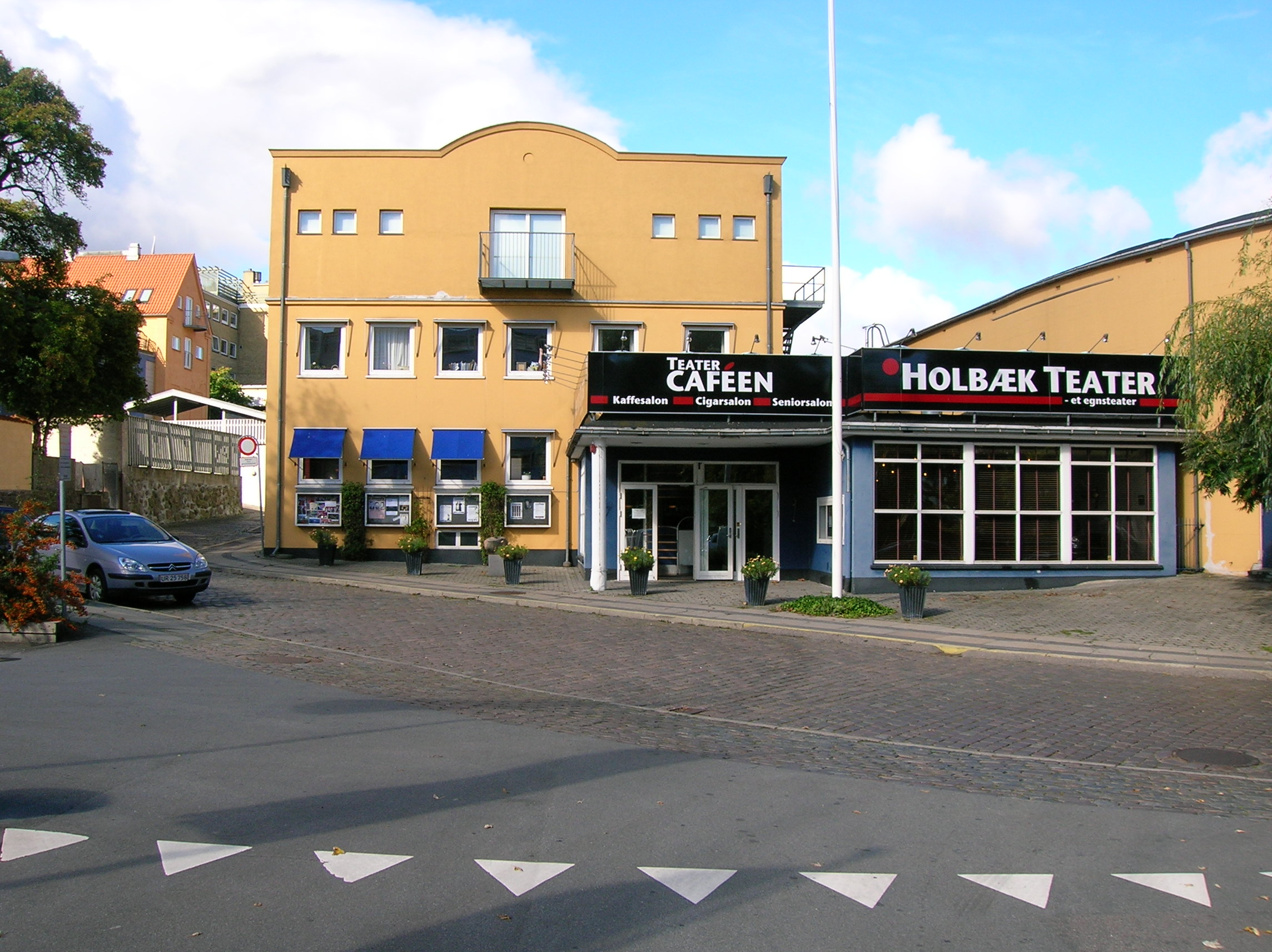 Holbæk Teater. I forgrunden ses hajtænder (vigelinje)